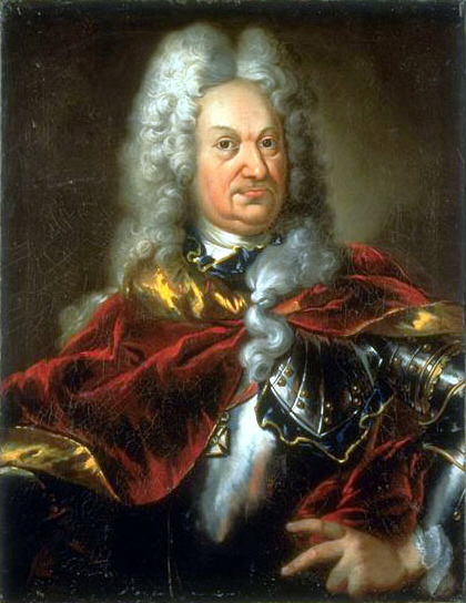 Herrenporträt Heinrich Bürkli, kaiserlicher Feldmarschall, mit dem brandenburgisch-kulmbachischen Orden vom roten Adler. Öl auf Leinwand. Datiert 1744.